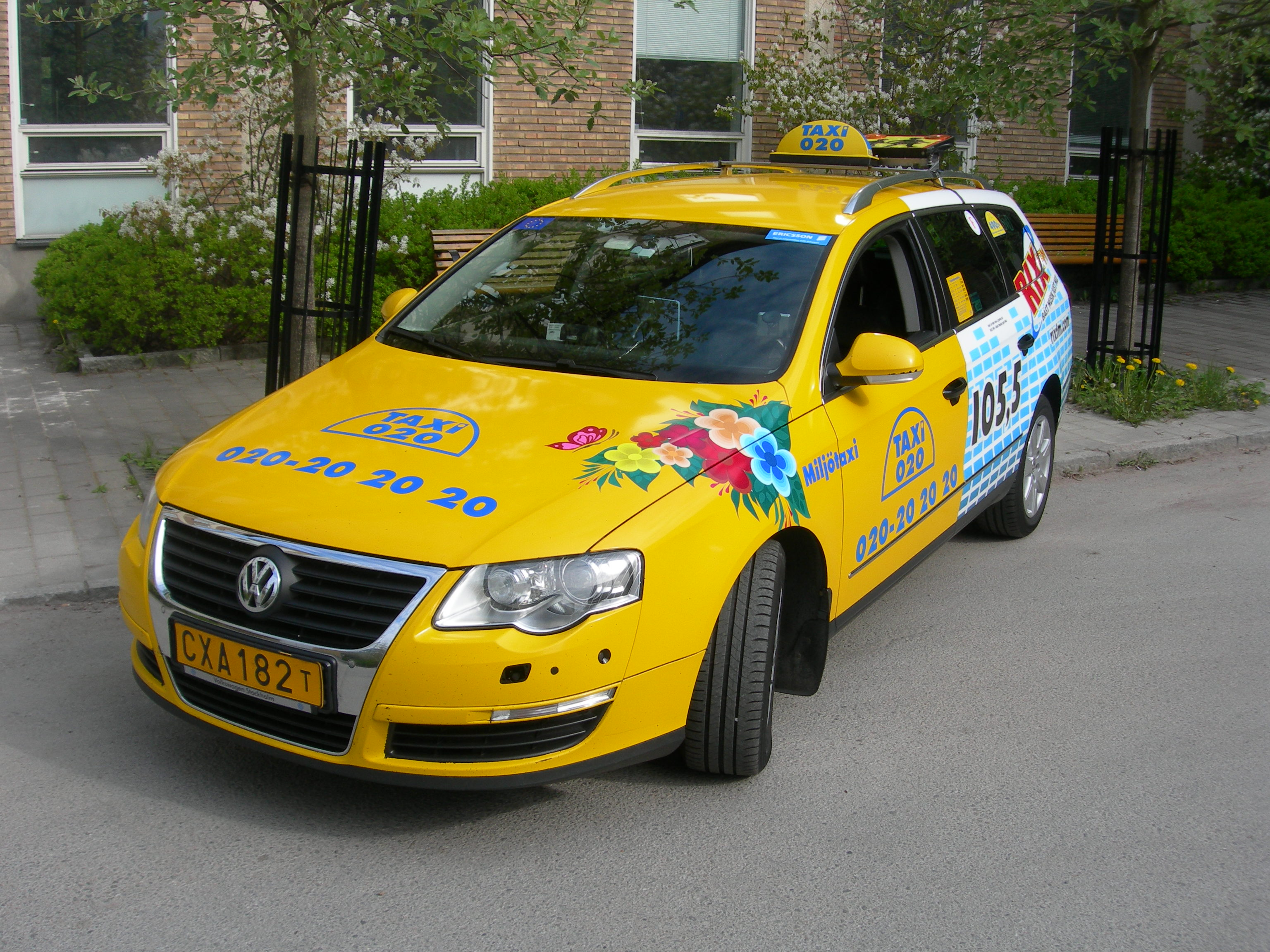 Taxi 020 sommaren 2010